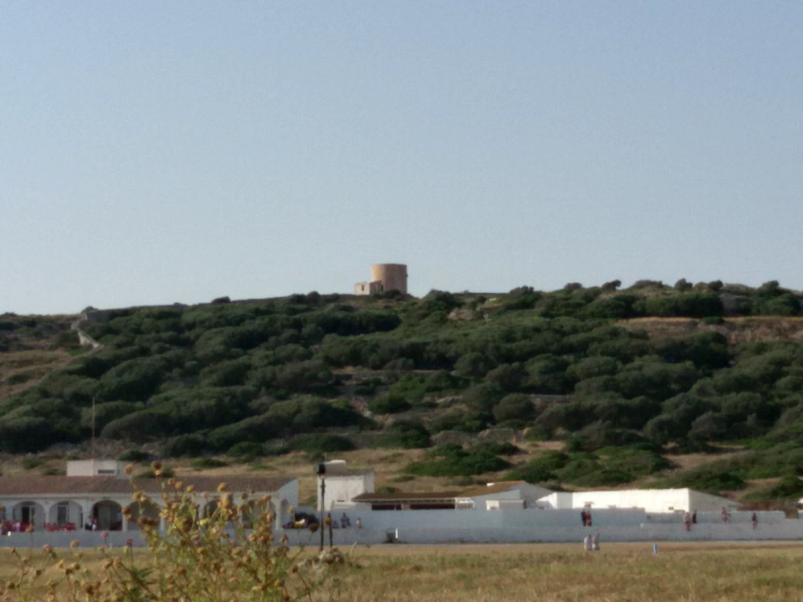 Torre de Bajaolí cerca de Ciudaldela, Menorca, Islas Baleares España